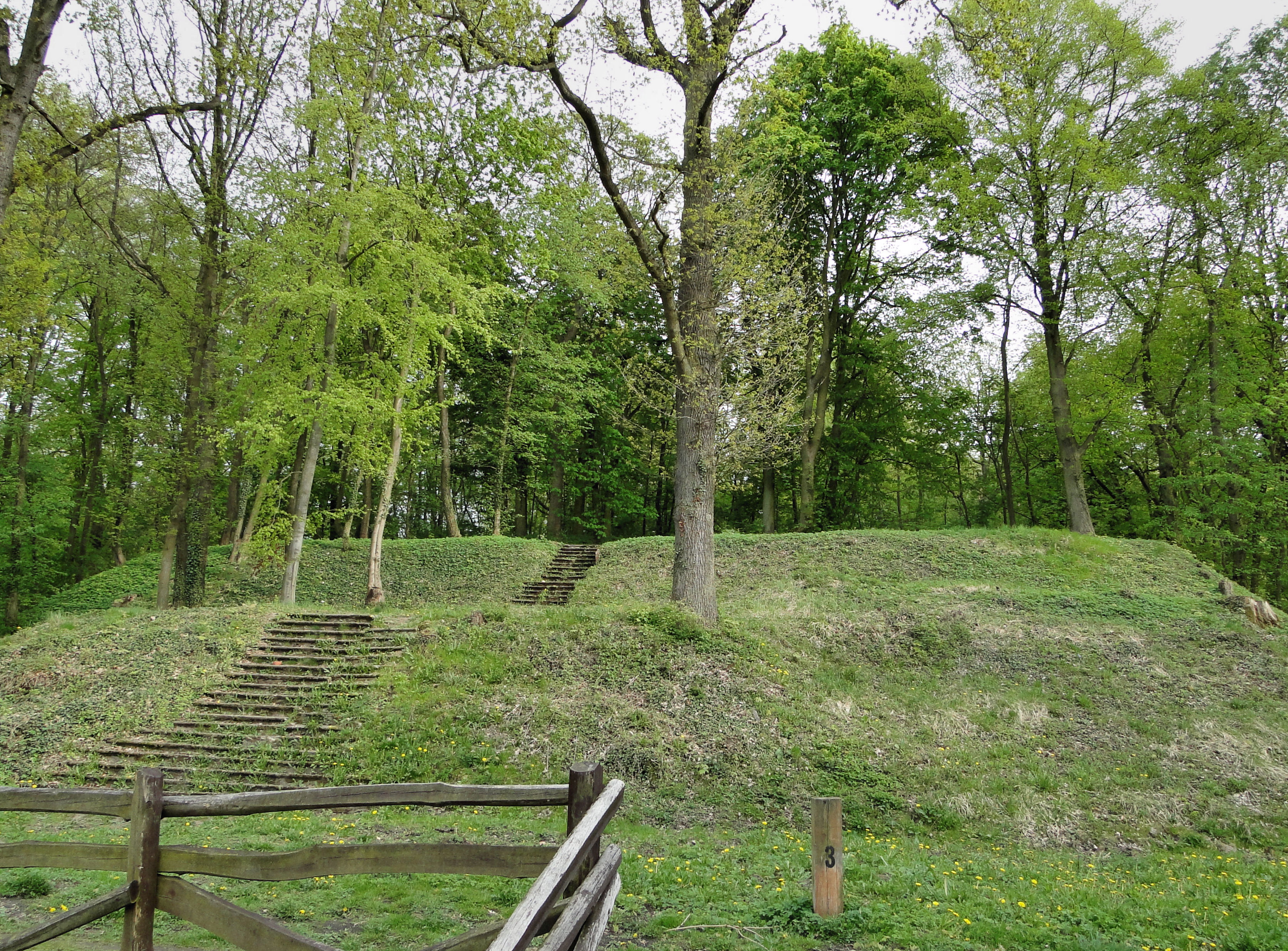 Miejsce, na którym wznosiła się Wieża Baresela